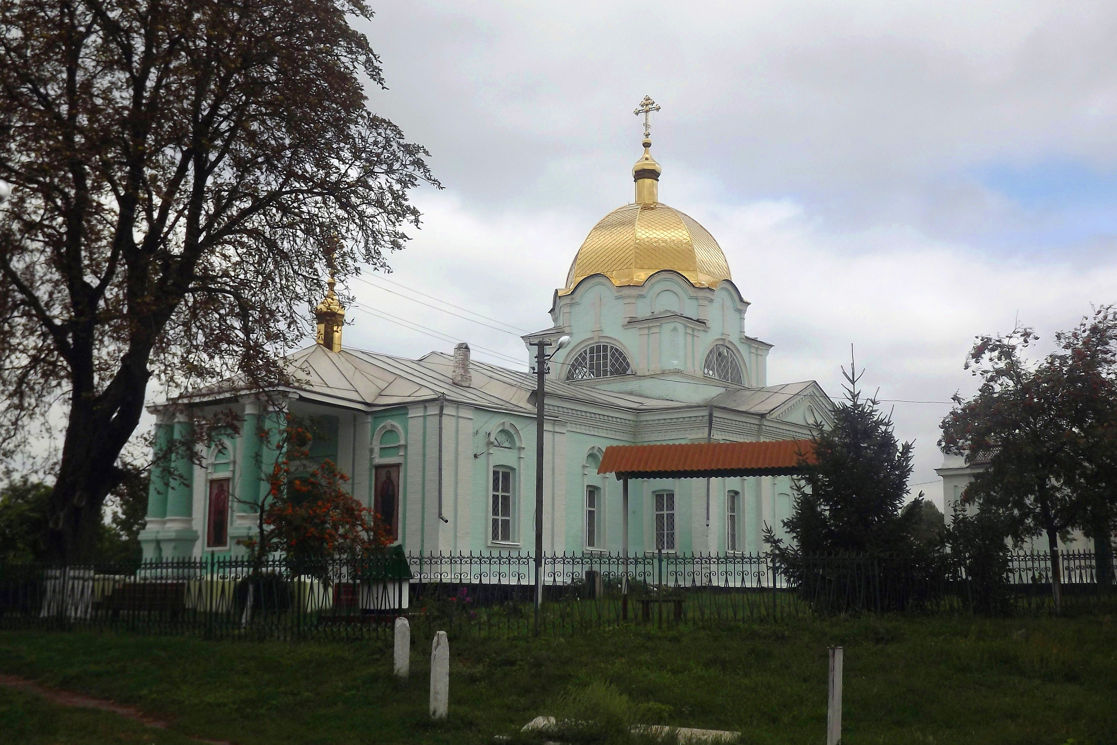 Миколаївська церква (Новомиргород, Кіровоградська область)